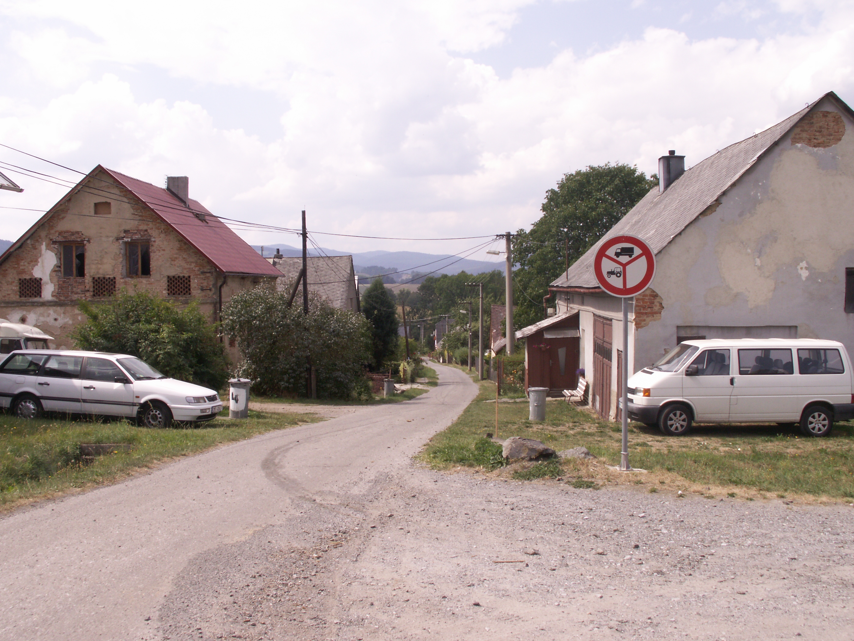 osada Rožmitál, část města Zlaté Hory, okres Jeseník, Olomoucký kraj